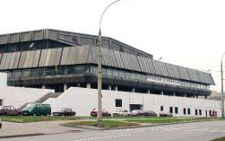 УДС Крылья Советов